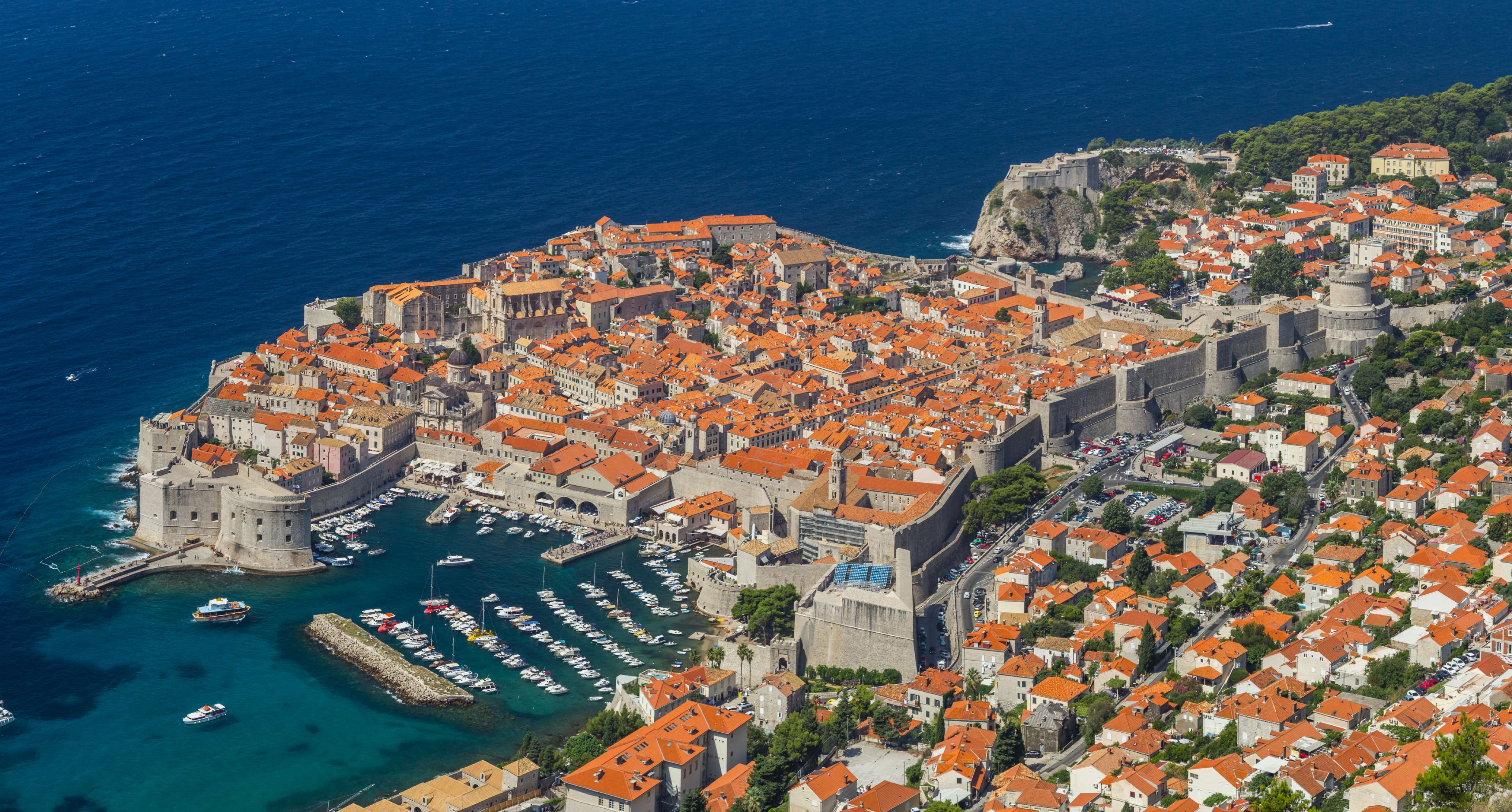 Gradske zidine i utvrde